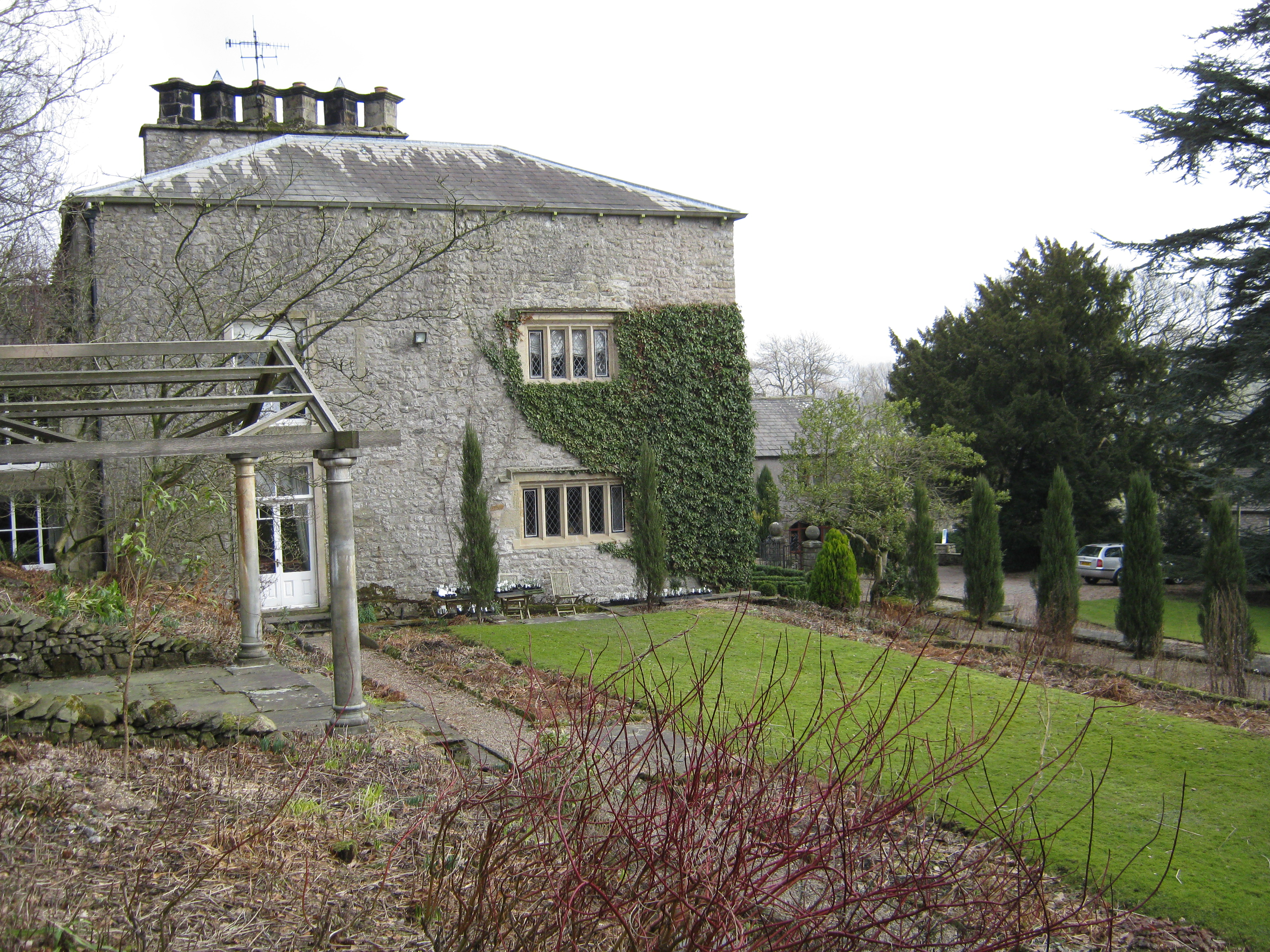 Austwick Hall.